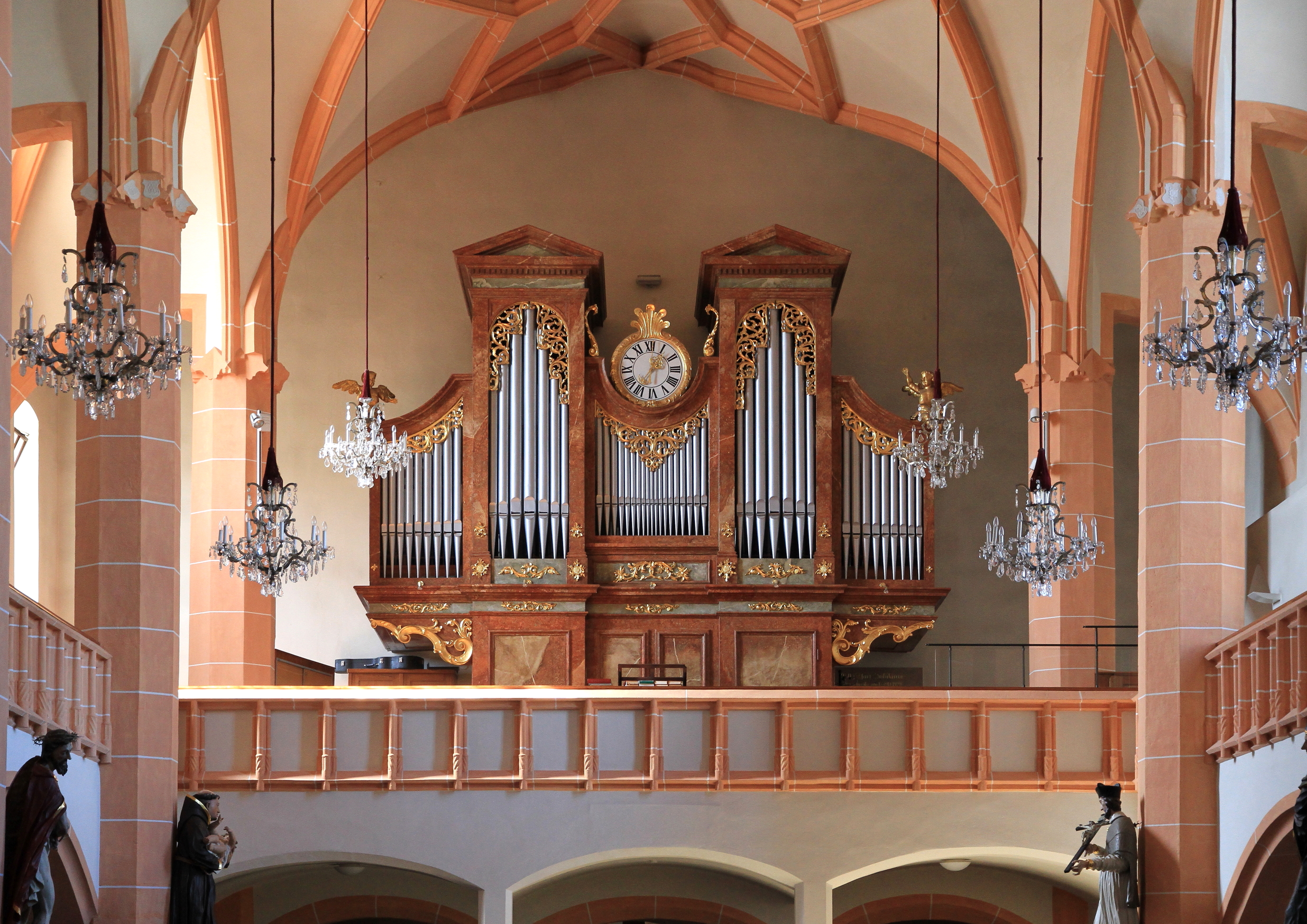 Die Orgel der katholische Pfarrkirche hl. Michael in der niederösterreichischen Marktgemeinde Stadt Steinakirchen am Forst. Die Orgel wurde 1878 von Josef Breinbauer gebaut. Anlässlich des 950-jährigen Pfarrjubiläums 1929 wurde in das alte Gehäuse von Orgelbau Gebrüder Mauracher eine neue Orgel mit etwa 1450 Pfeifen eingebaut.